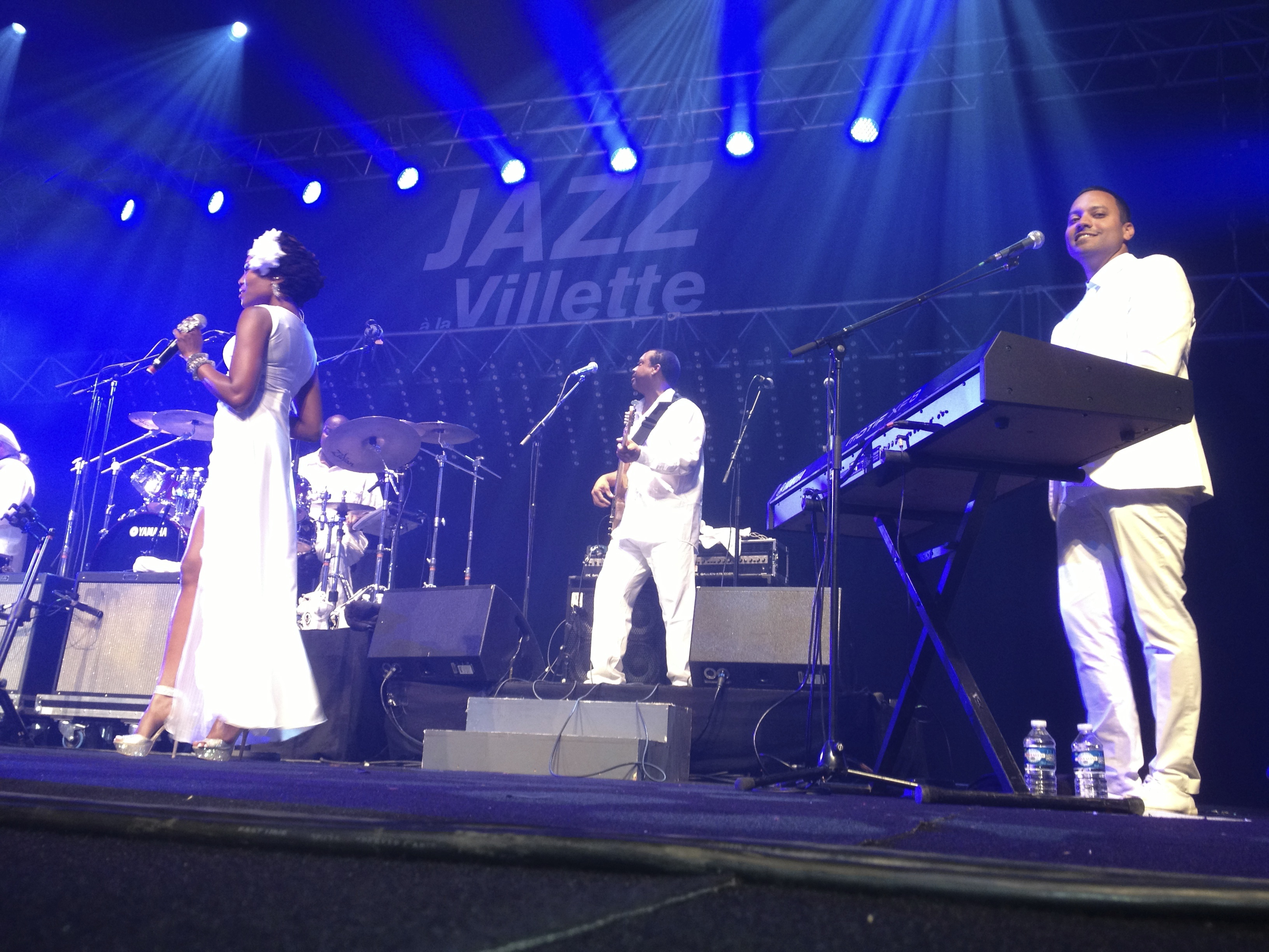 Chic en concert à Paris le 10 septepmbre 2013. Au premier plan, Selan Lerner (claviers et chant)